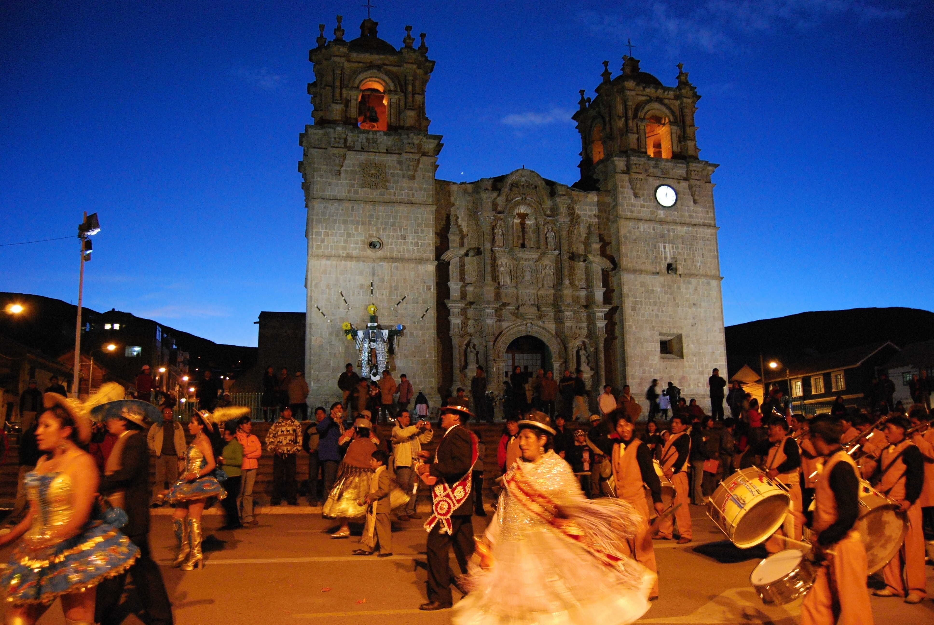 Puno - katedrála